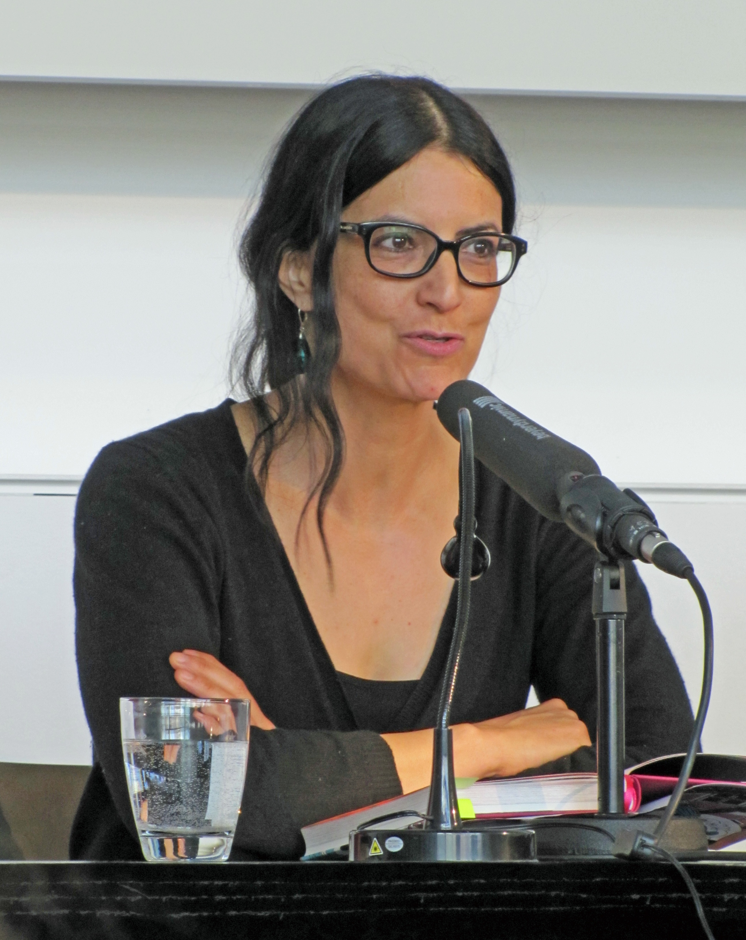 Ingrid El Sigai, Vorleserin, 2013 in Frankfurt am Main, beim Langen Tag der Bücher im Chagallsaal des Schauspielhauses Ffm.